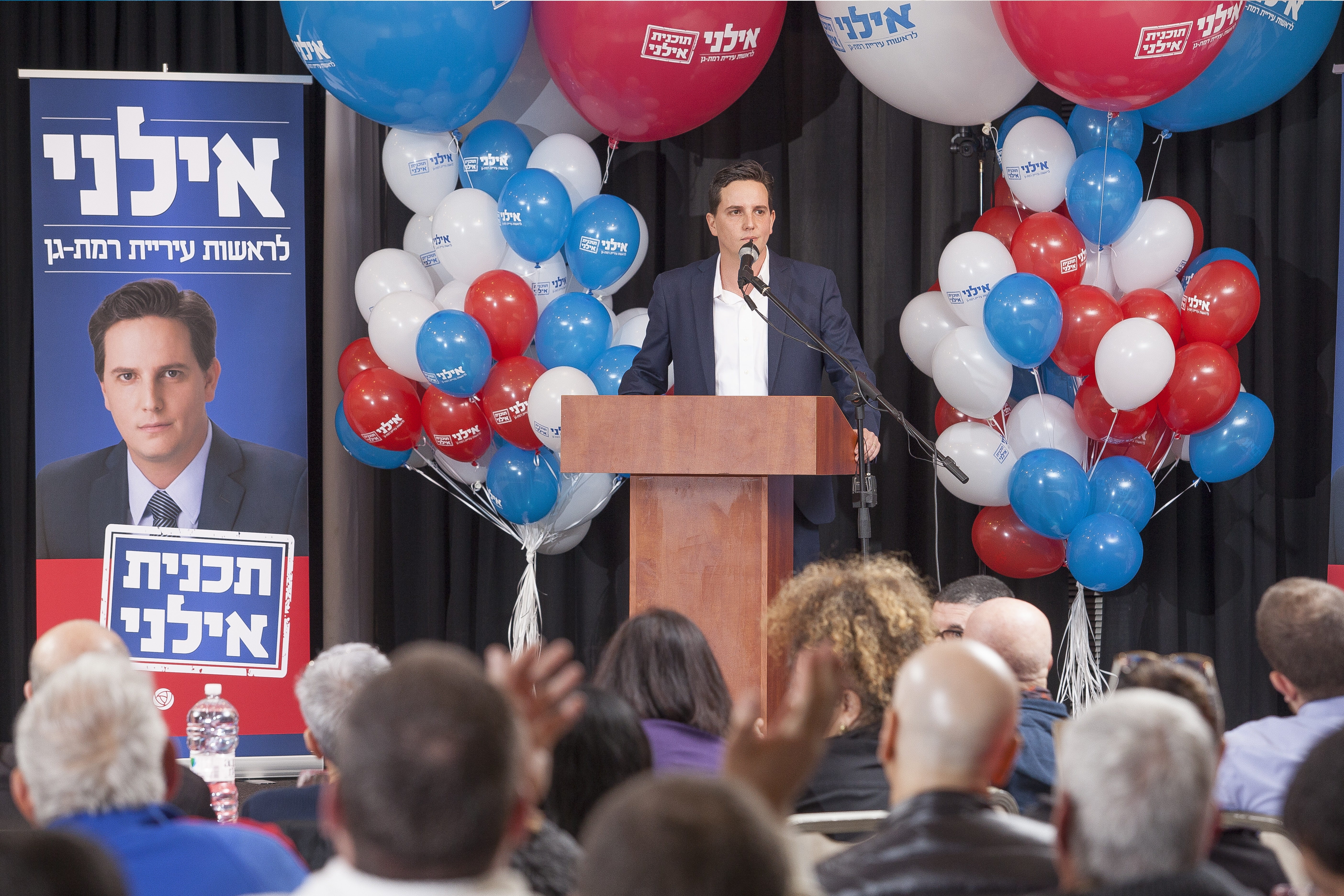 ליעד אילני המועמד לראשות עיריית רמת-גן בכנס השקת קמפיין הבחירות שלו ב- 29.01.18